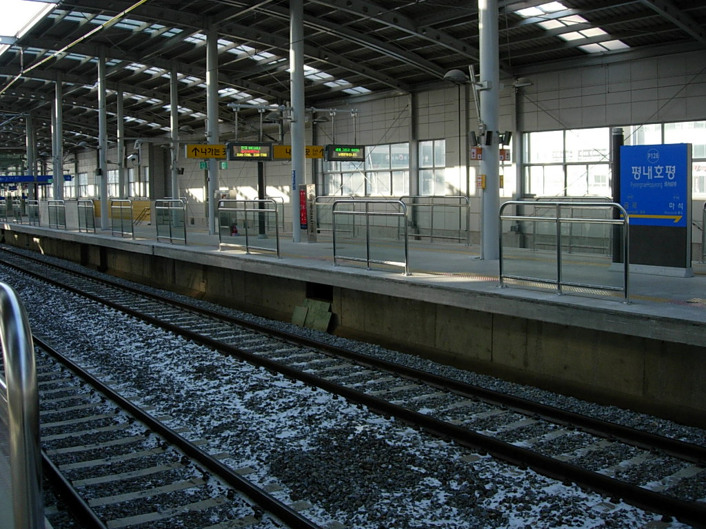 평내호평역 승강장